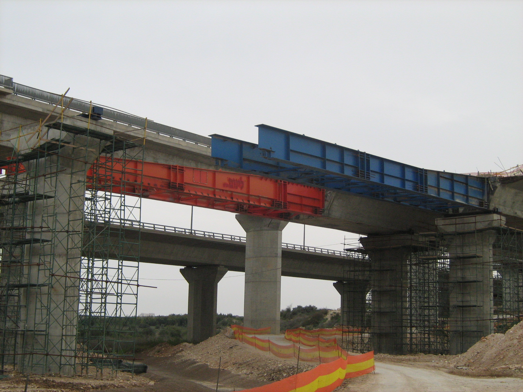 גשרי כביש 431 והרכבת למודיעין מעל נחל ענבה